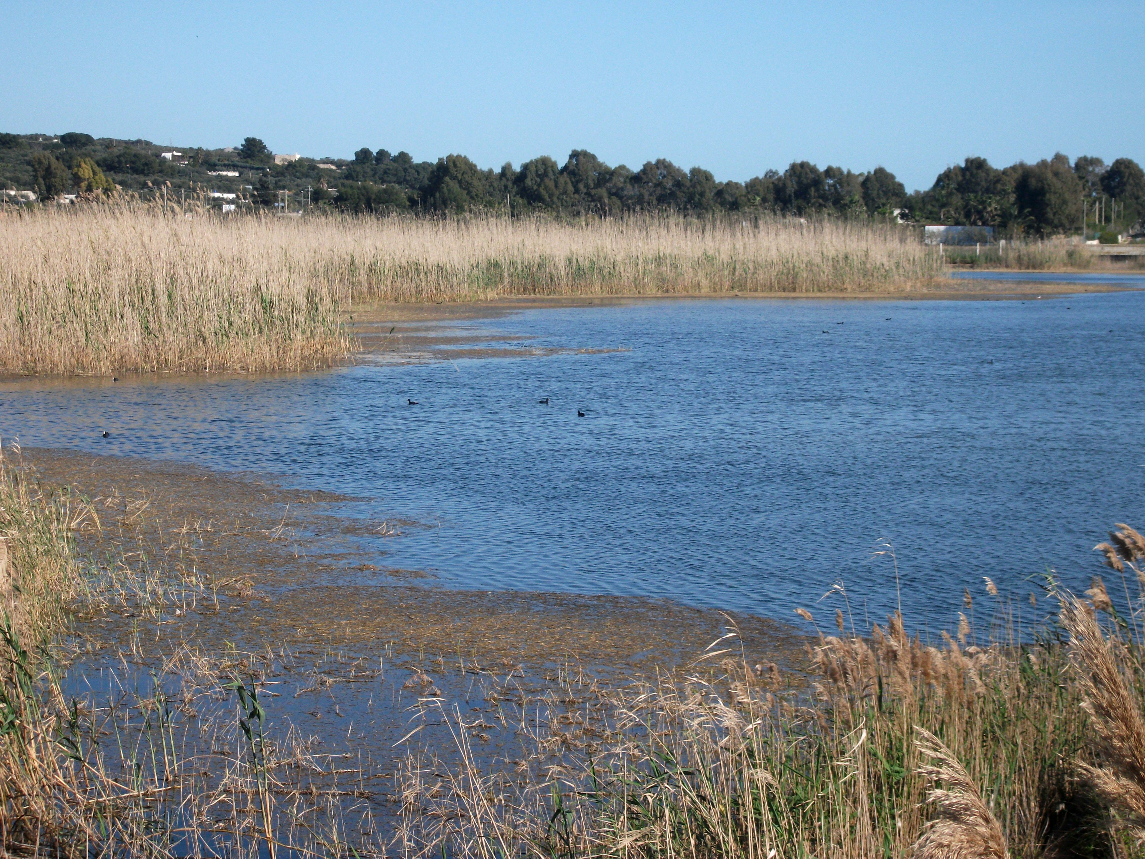 vista di uno dei bacini di ugento